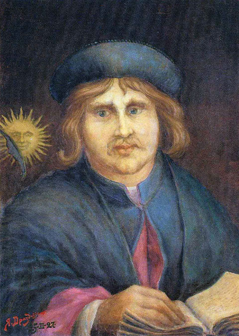 1927 г. Матэр'ял і тэхніка картон, алей Памеры 71,5 х 51,5 Месцазнаходжанне Музей старажытнай беларускай культуры Інстытута мастацтвазнаўства, этнаграфіі і фальклору НАН Беларусі